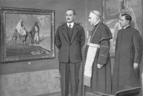 Prymas August Hlond podczas zwiedzania wystawy Aleksandra Laszenki w Poznaniu. Od lewej Aleksander Laszenko, August Hlond i ksiądz Bolesław Filipiak.